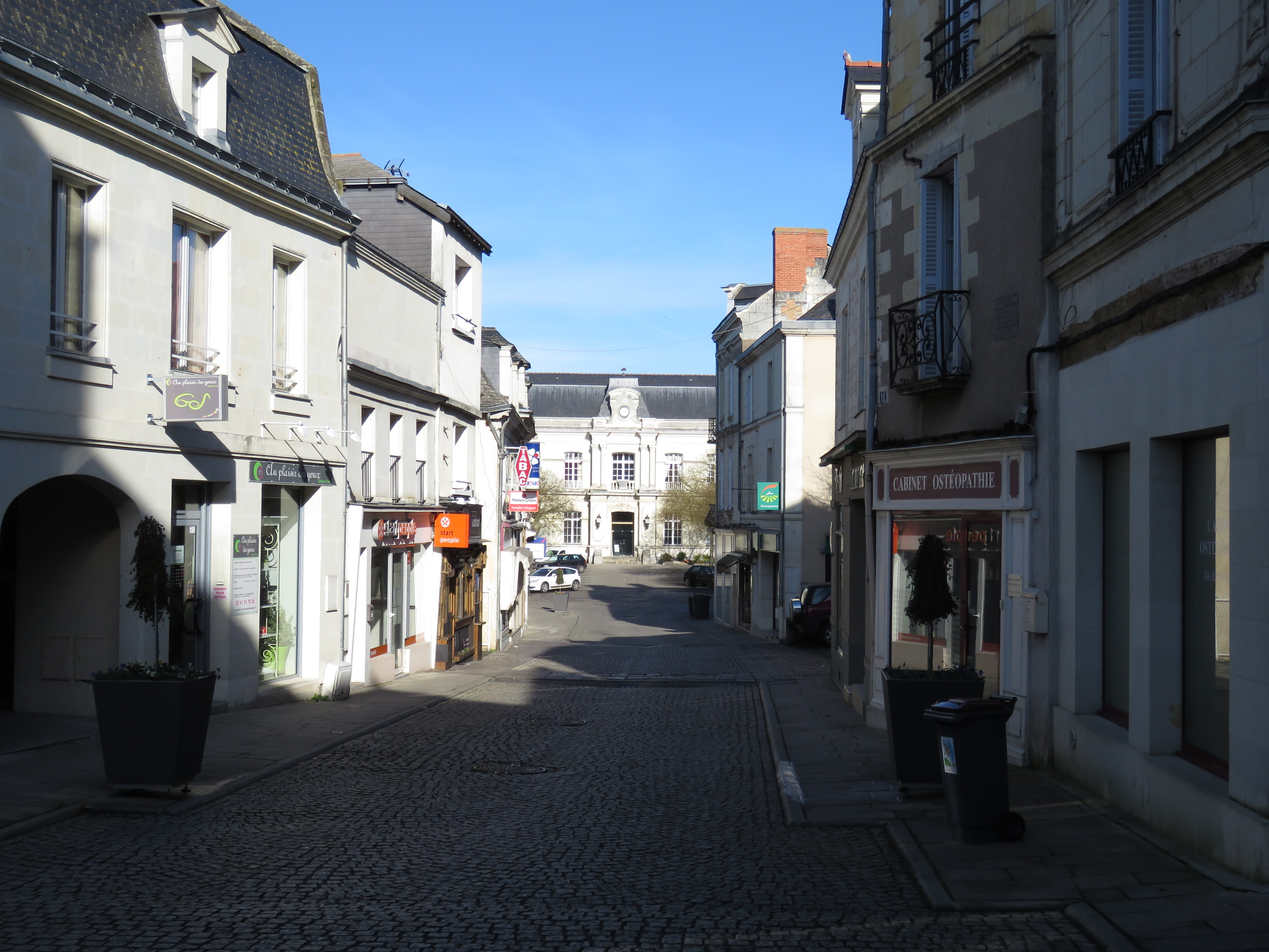 Hotel de ville de Longué vu de la Rue Yvonne Compère.